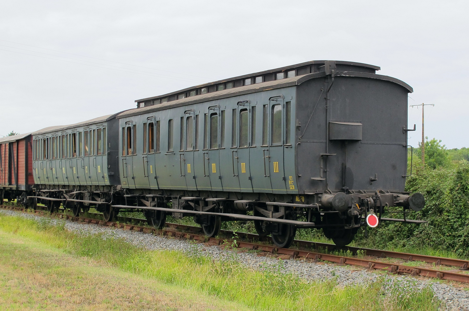 Les voitures C7 tf 15062 et B2C4 5231 en ligne au Train des Mouettes vers Breuillet (17) le 18 septembre 2016.